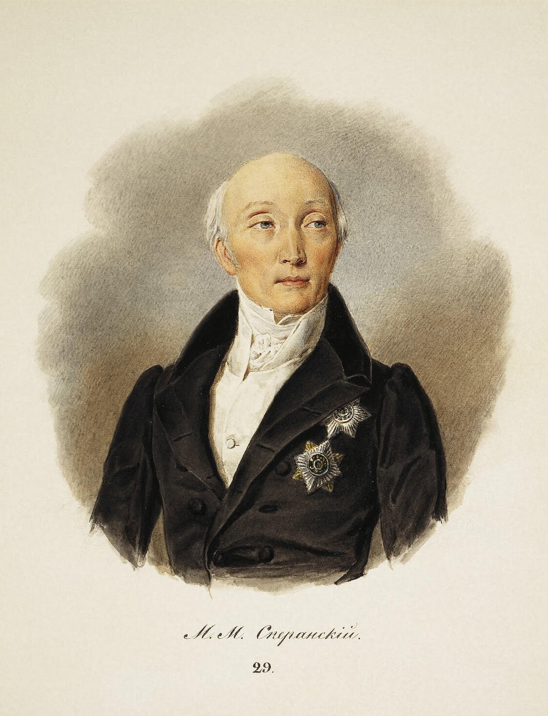 Серия "Портреты воспитателей будущего императора Александра II"